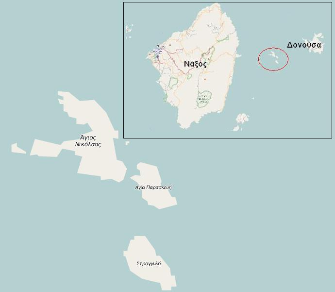 Μακάρες